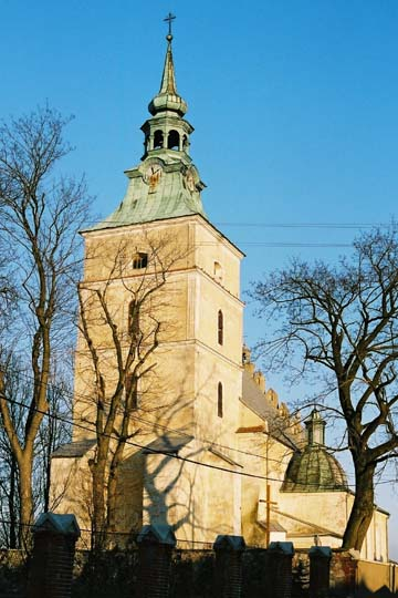 Kościół pw. św. Marcina w Lelowie